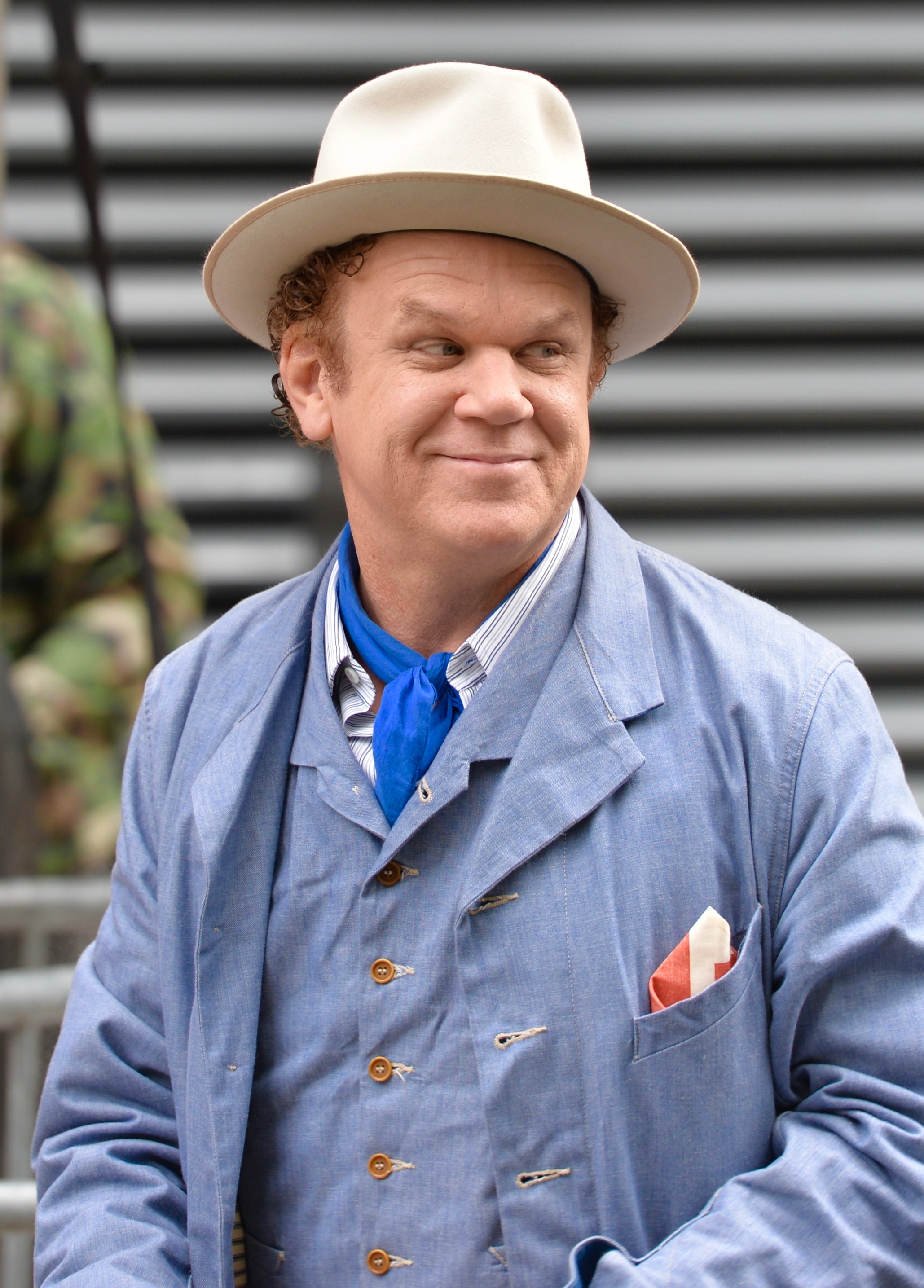 TIFF 2018 - Sister Brothers